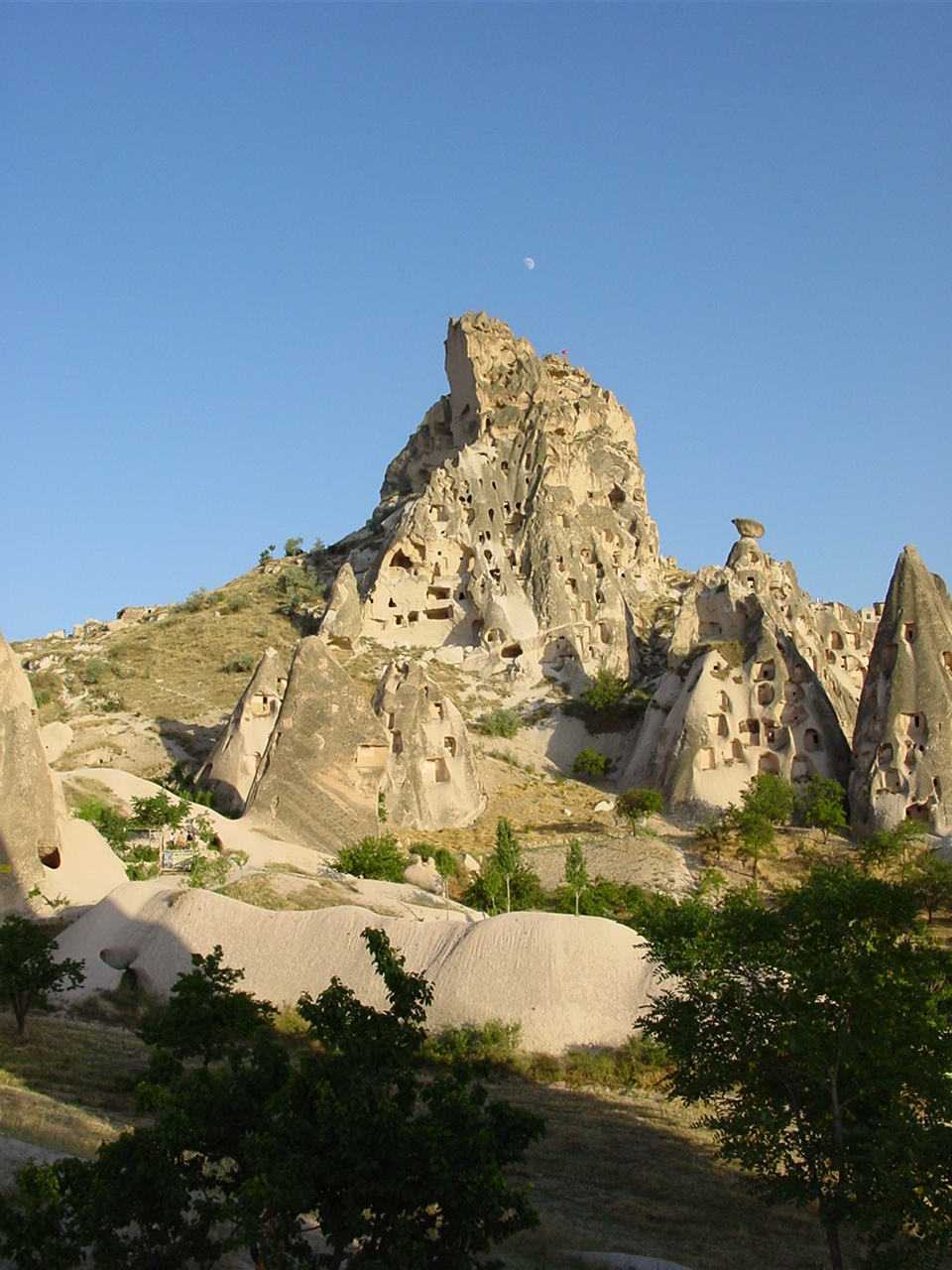 Vista di abitazioni ricavate nel tufo